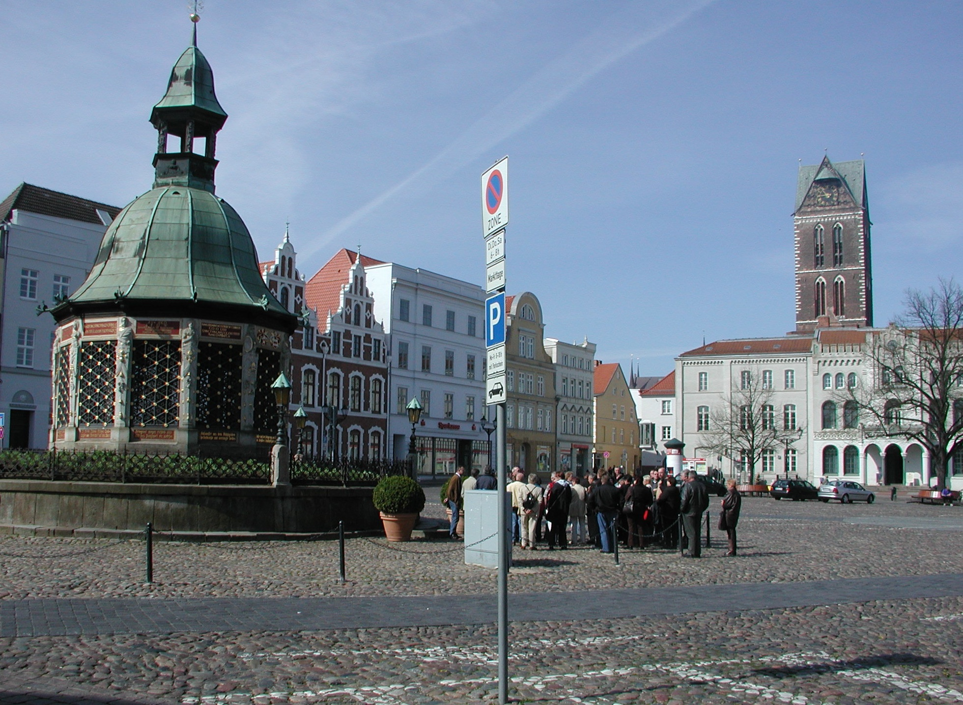 Wismarer Wasserkunst auf dem Marktplatz.